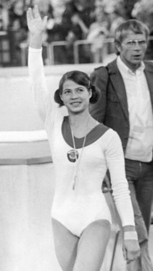 ADN-ZB-Kohls-30.8.1972-sche-München: XX. Olympische Sommerspiele. Wie schon im Mannschaftskampf, war auch das Mehrkampffinale ein Beweis für die Überlegenheit des Frauen-Turnens, der sozialistischen Länder. Medaillengeschmückt und überglücklich verlassen die Siegerinnen des glanzvollen Turniierereignisses, Karin Janz (DDR, Silber), Ludmilla Turistsschewa (Gold) und Tamara Lasakowitsch (Bronze, beide UdSSR, v..l.) die Wettkampfstätte. Information added by Wikimedia users.